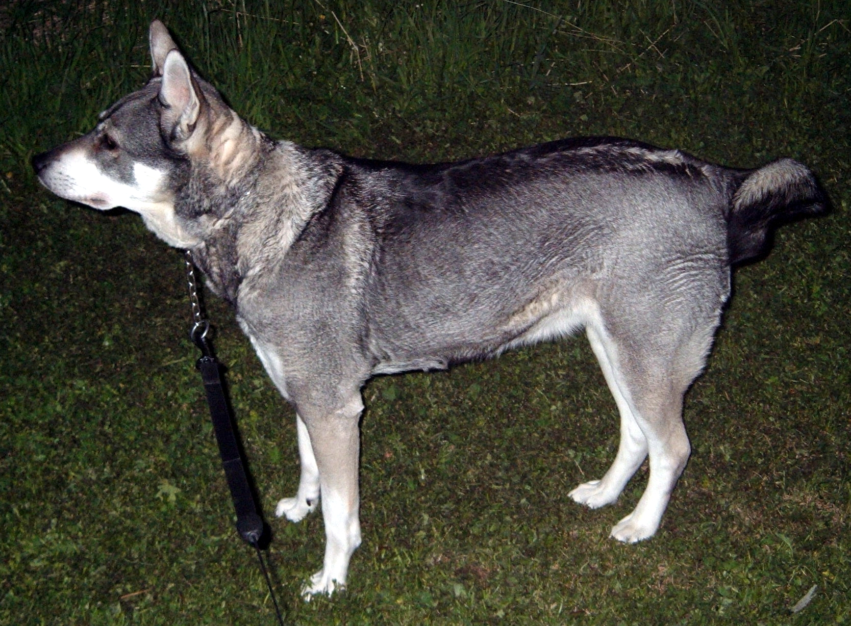 Jämthund